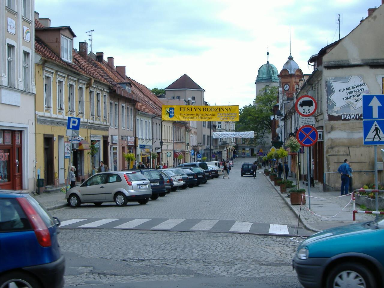 ul. Boh Westerplatte we Wschowie